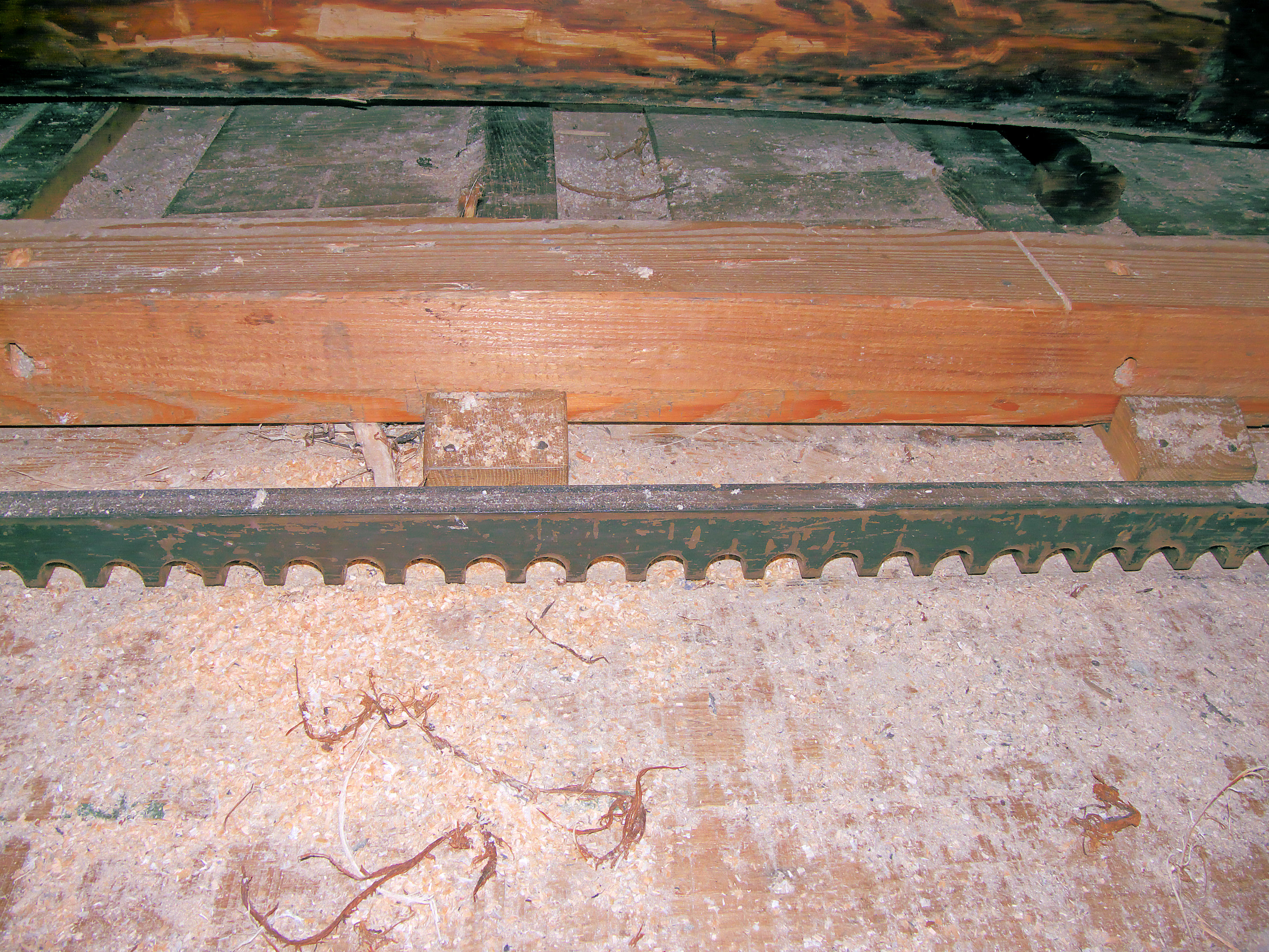 Molen Het Jonge Schaap, tandheugel aan zaagslee